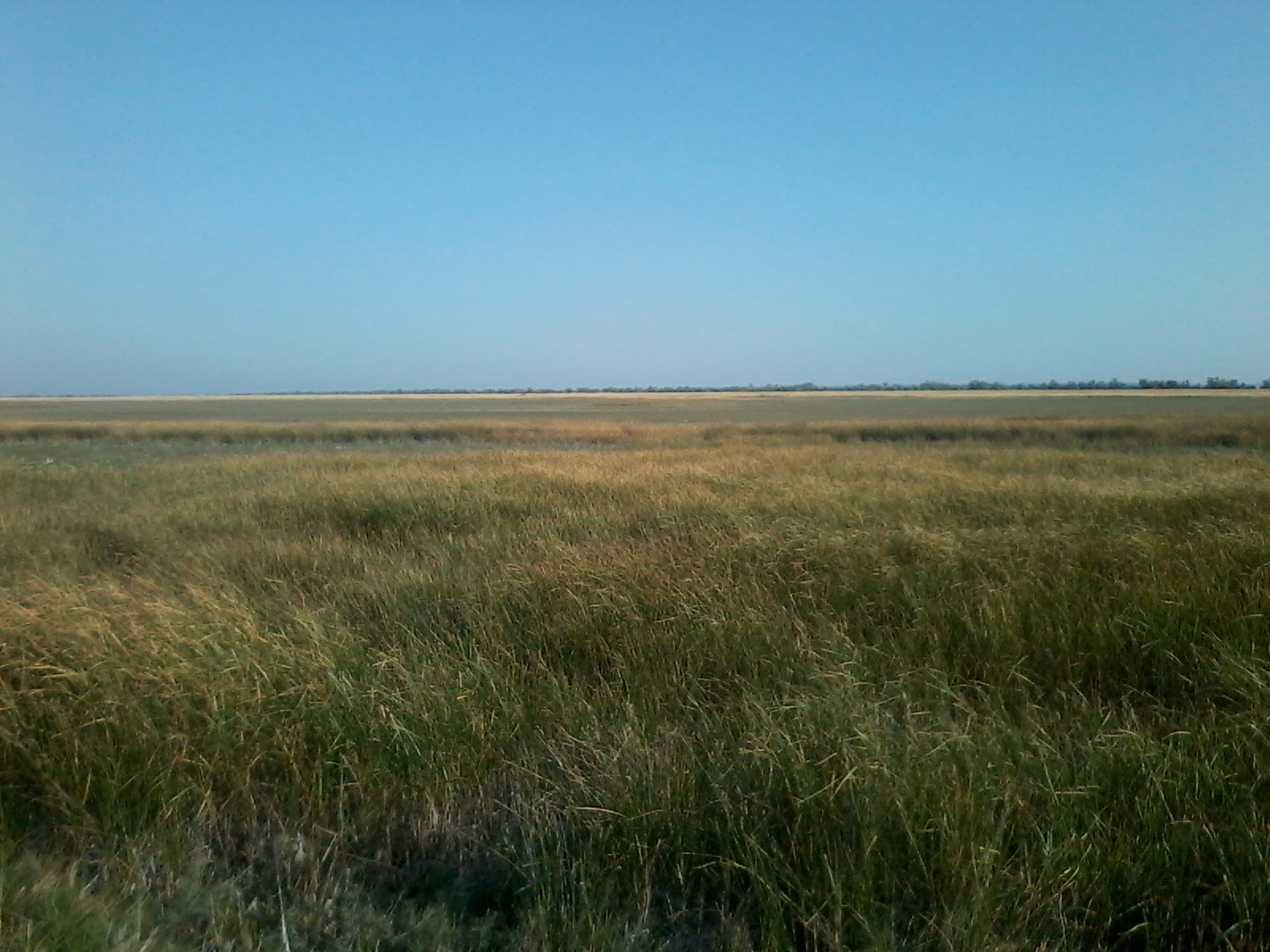 Кінбурнська коса, літо 2015